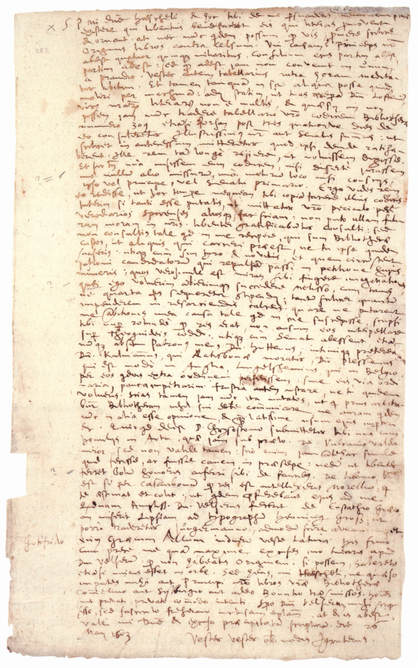 Brief von Janus Gruter (1560–1627) an David Hoeschel (1556–1617) vom 26. Mai 1603. Universitätsbibliothek Heidelberg, Heid. HS 4054